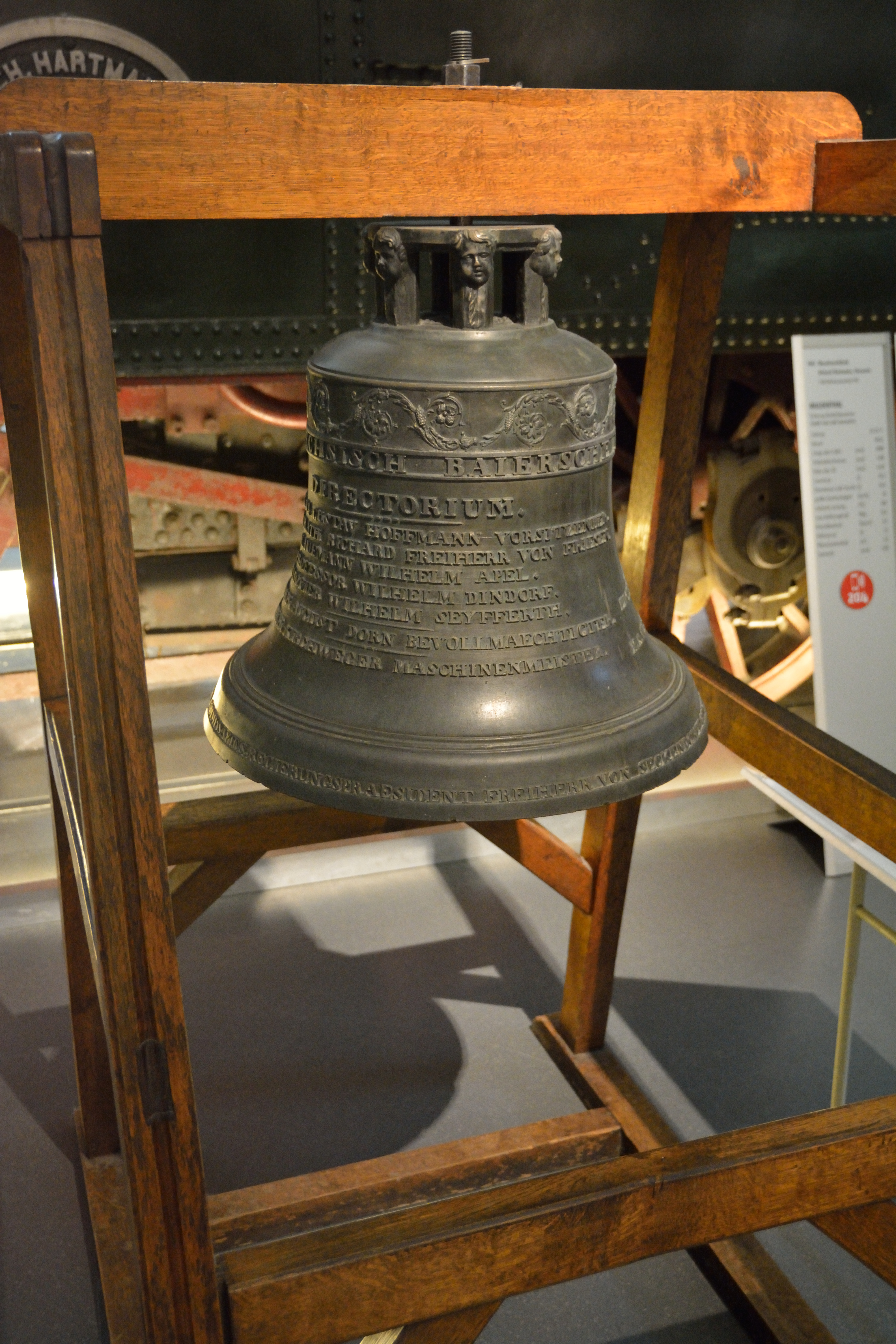 Die alte Bahnhofsglocke des Leipzig Bayerischer Bahnhofes von 1842. Ausstellungsstück im Verkehrsmuseum Dresden.